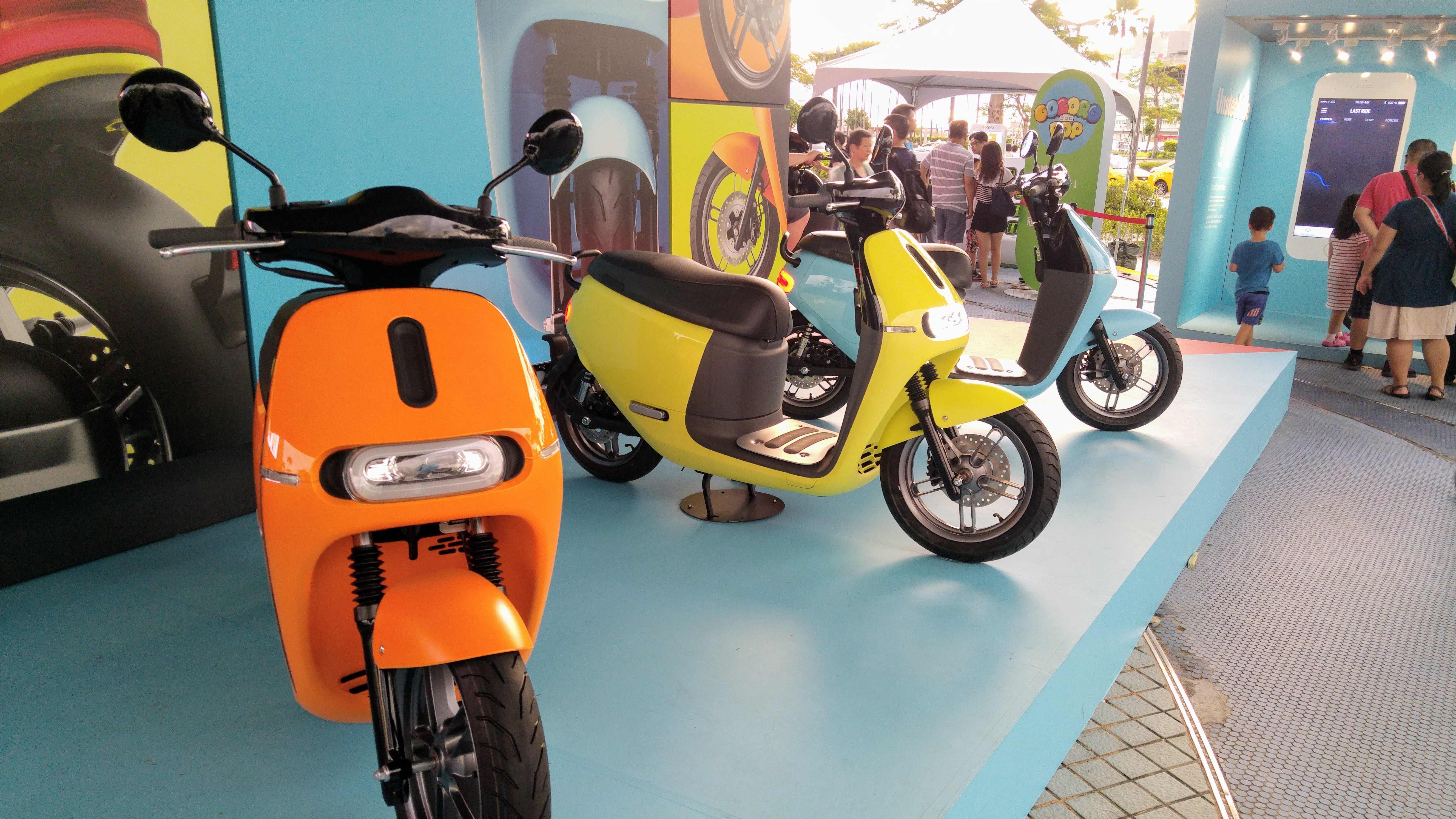 Gogoro 2 Series 上市初期時所舉辦的 Gogoro Wonderland。